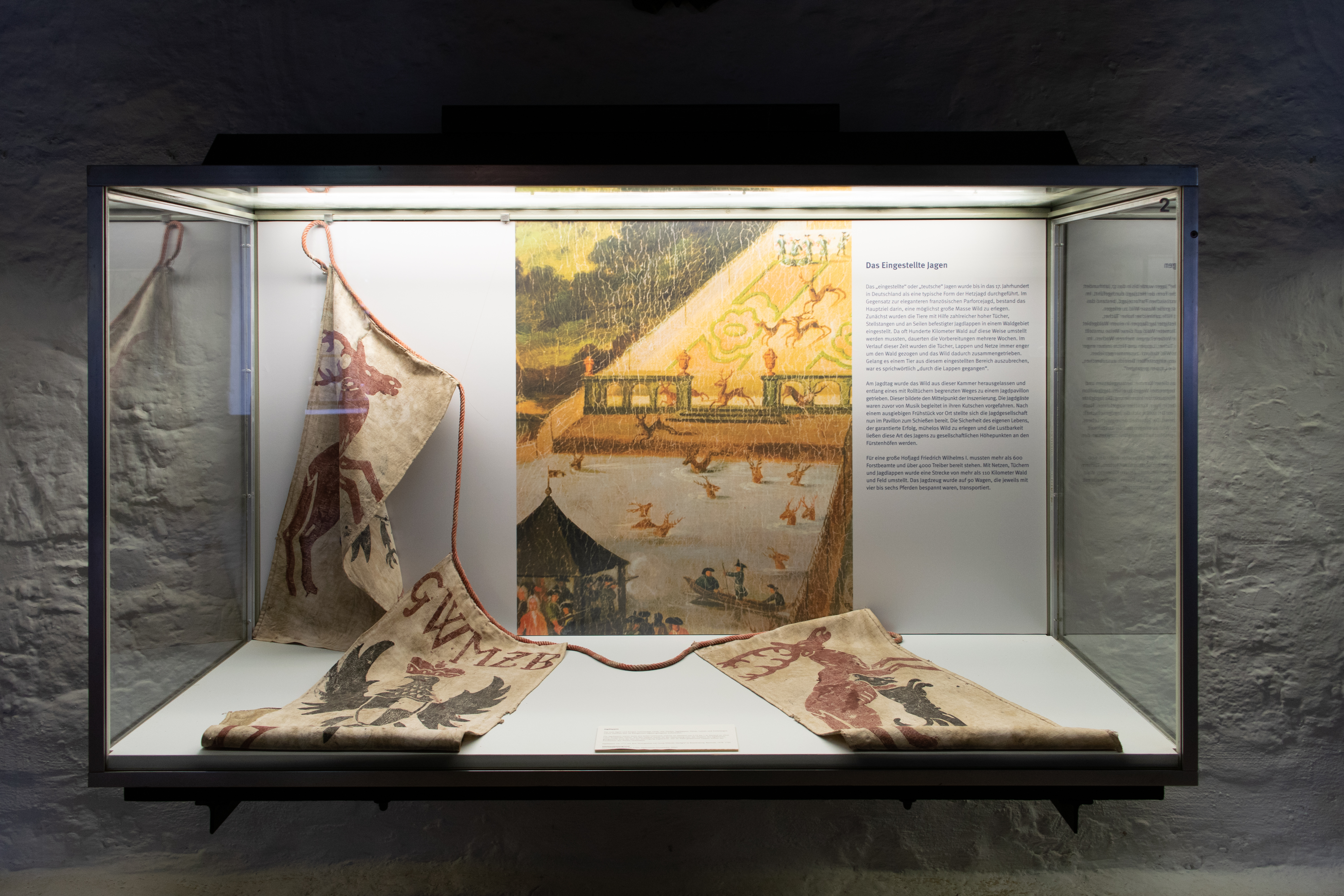 Glam on Tour Jagdschloss Grunewald, Berlin Jagdlappen von 1717. GWMZB = Georg Wilhelm Markgraf zu Brandenburg-Bayreuth (1678–1726) Quelle: Winfried Baer: III. Aus der Jagdsammlung im Jagdzeugmagazin. Staatliche Schlösser und Gärten Berlin (Hrsg.): 450 Jahre Jagdschloss Grunewald 1542–1992. Berlin 1992, S. 7